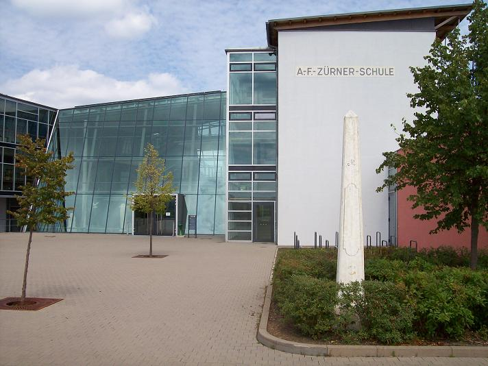 Berufsschulzentrum A. F. Zürner in Oelsnitz/Vogtl.